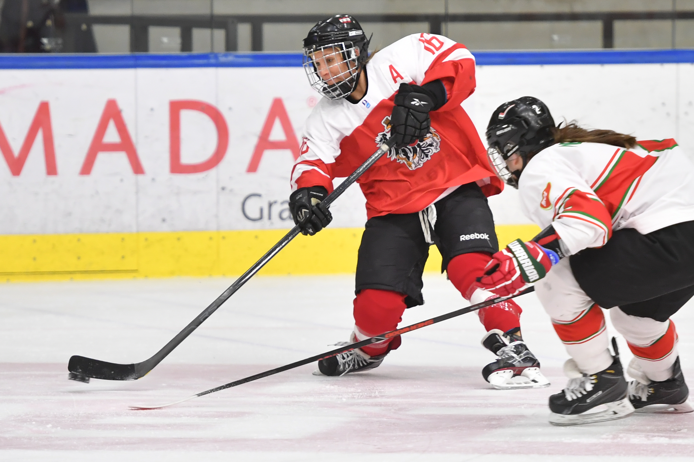 IIHF Eishockey Damen Weltmeisterschaft Division IA am 16. April 2017 in Graz.Bild zeigt Eva-Maria BEITER-SCHWARZLER (AUT).